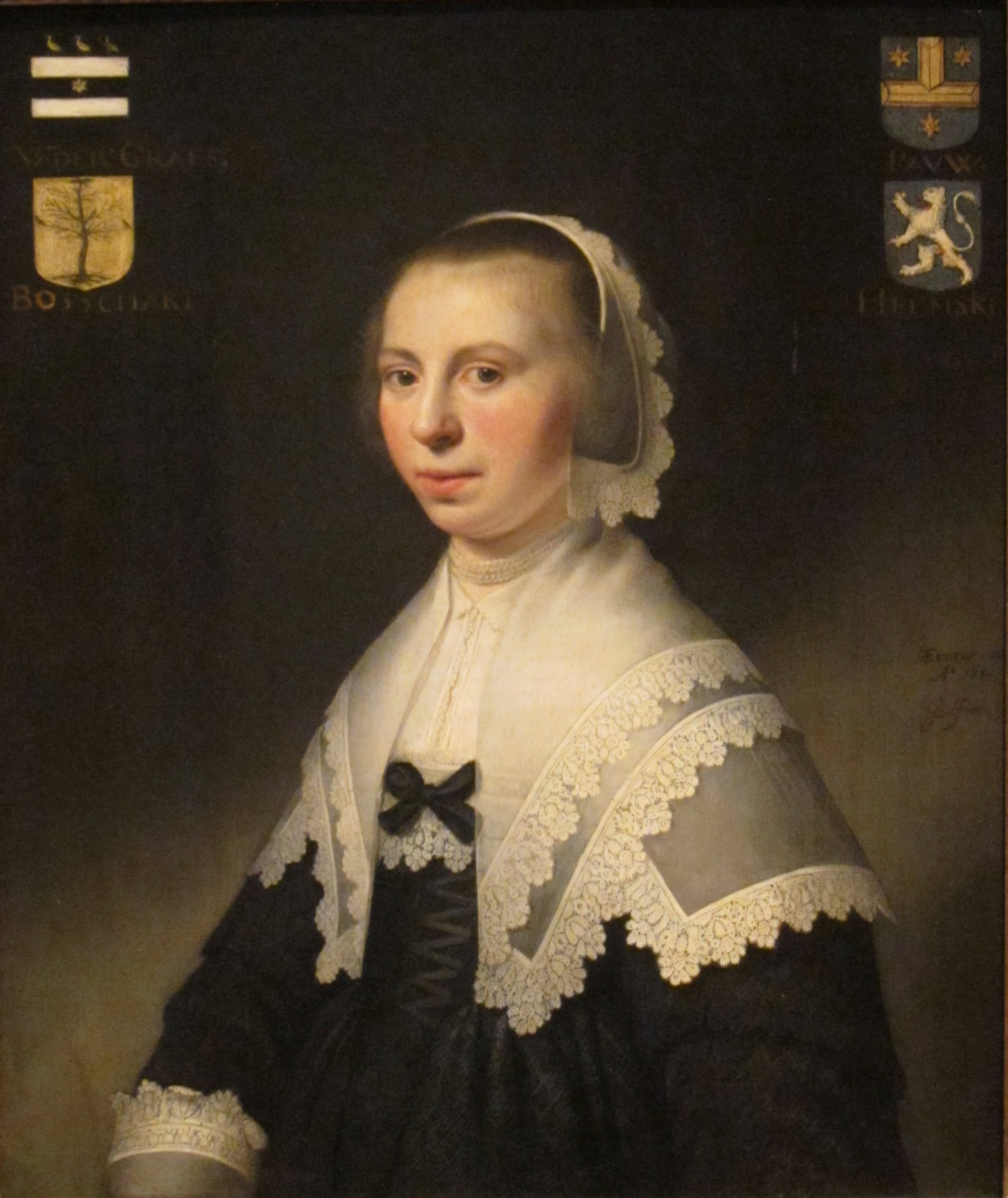 Portrait of Machteld van der Graeff